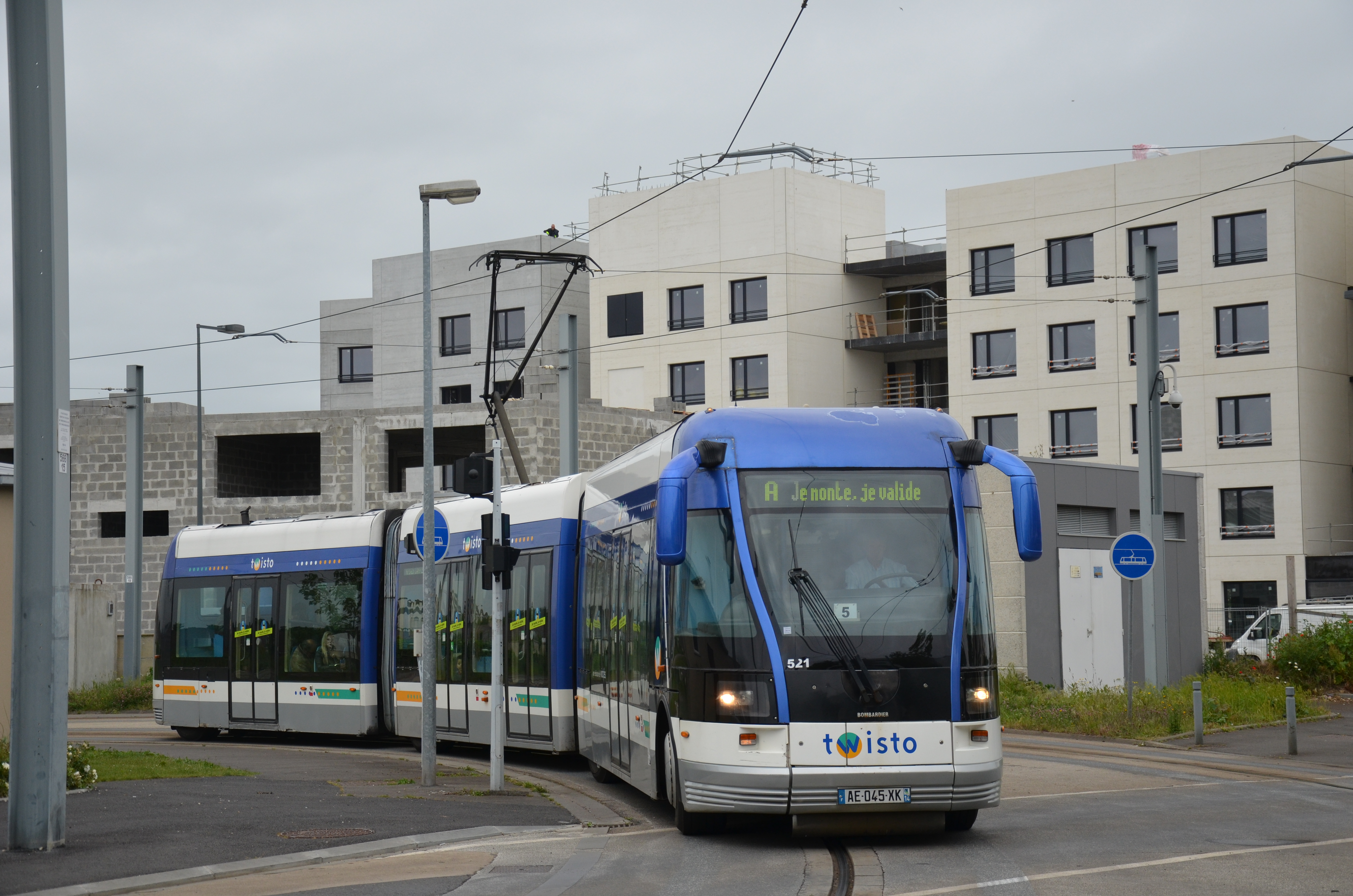 Bombardier TVR n°521 sur la ligne A du réseau Twisto de Caen, près de la station Poincaré.